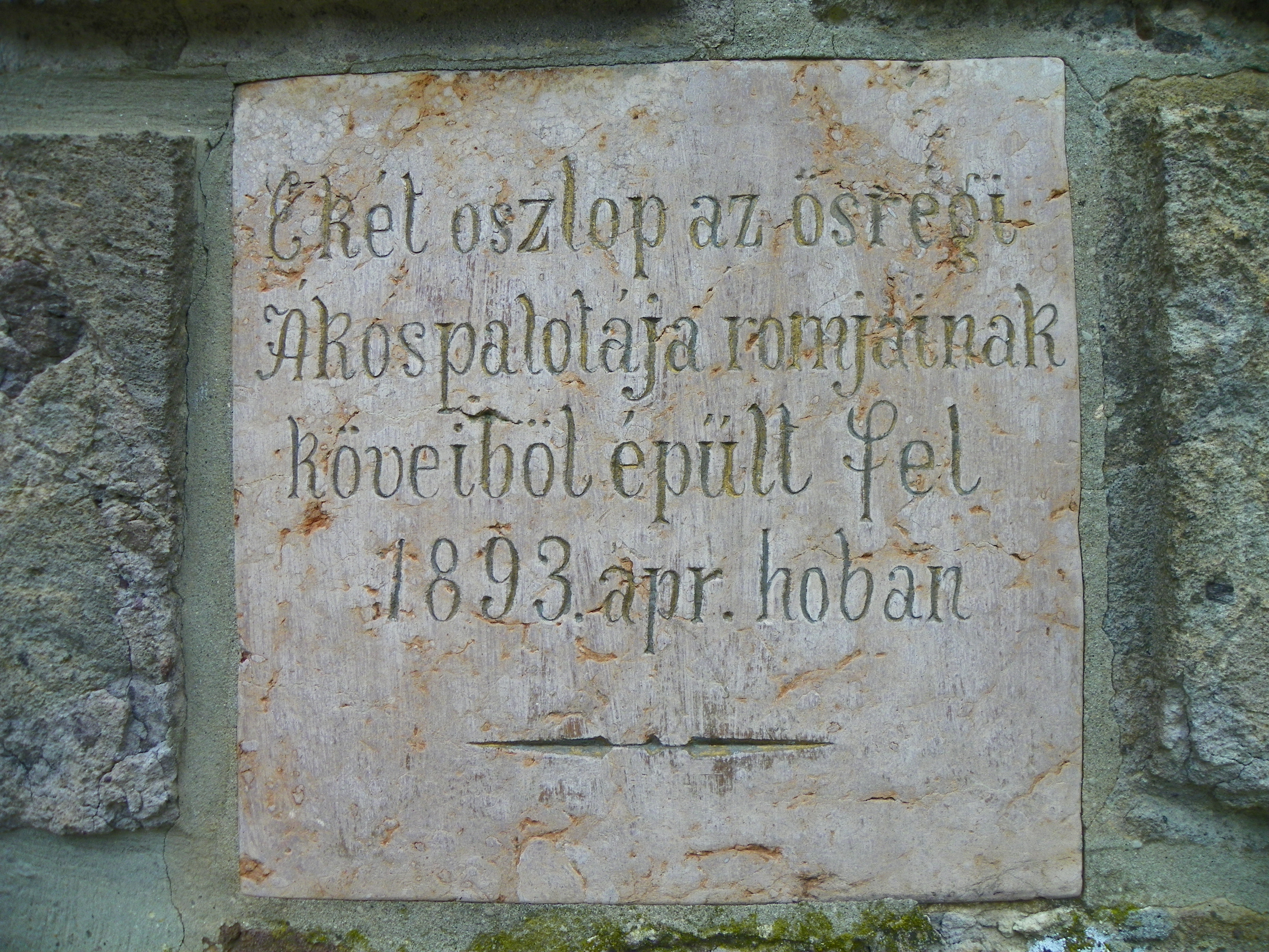 Emléktábla Búbánatvölgyben